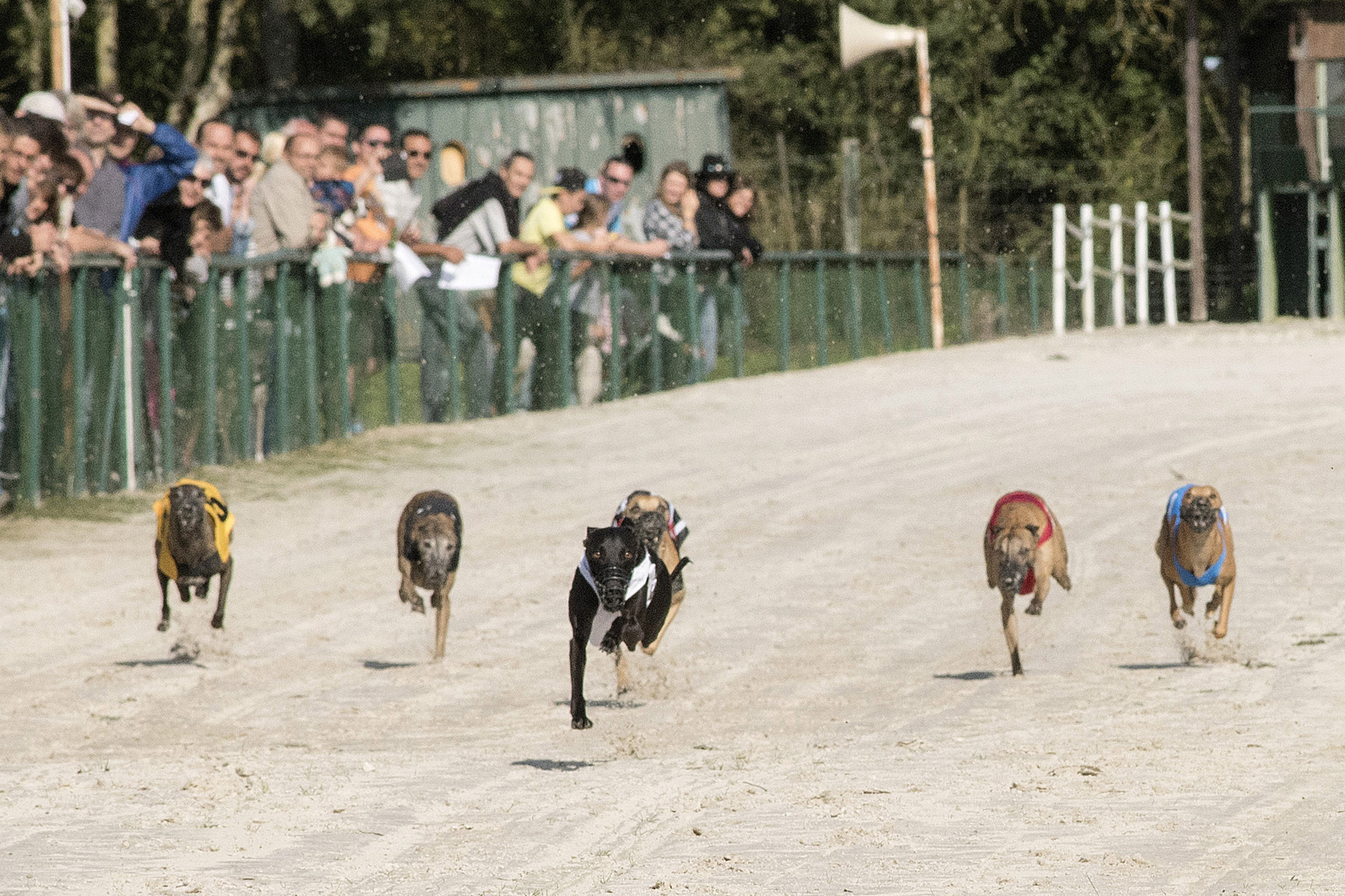 Cinq lévriers qui s'affrontent à l'arrivée.